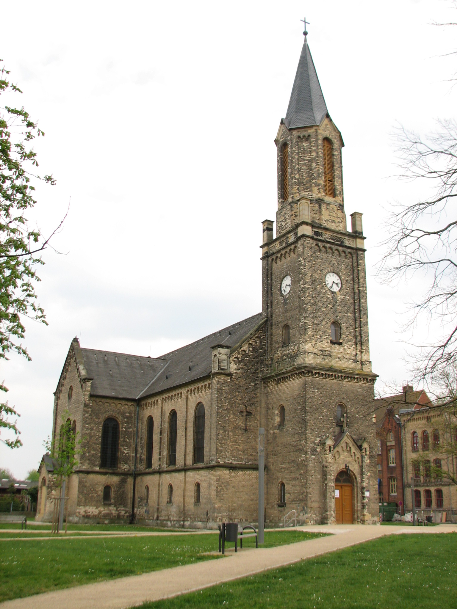 Kirche zu Leopoldshall, Foto vom April 2019